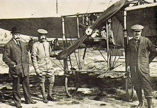 Primer vuelo en aeroplano de España, el 12 de febrero de 1910, en el hipódromo de Can Tunis de Barcelona, por el piloto francés Julien Mamet a bordo de un Blériot XI con motor de 25 CV.